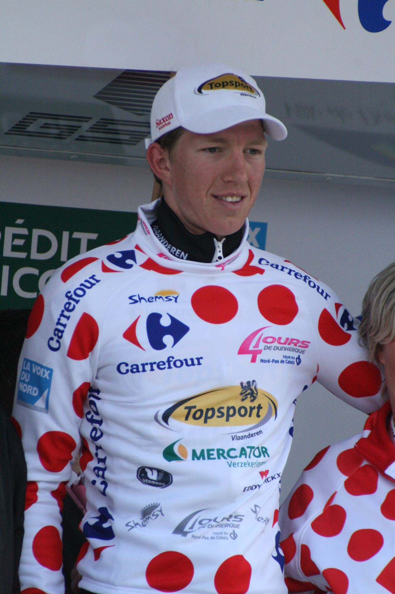 Sep Vanmarcke sur le podium de la 1re étape des Quatre jours de Dunkerque 2010